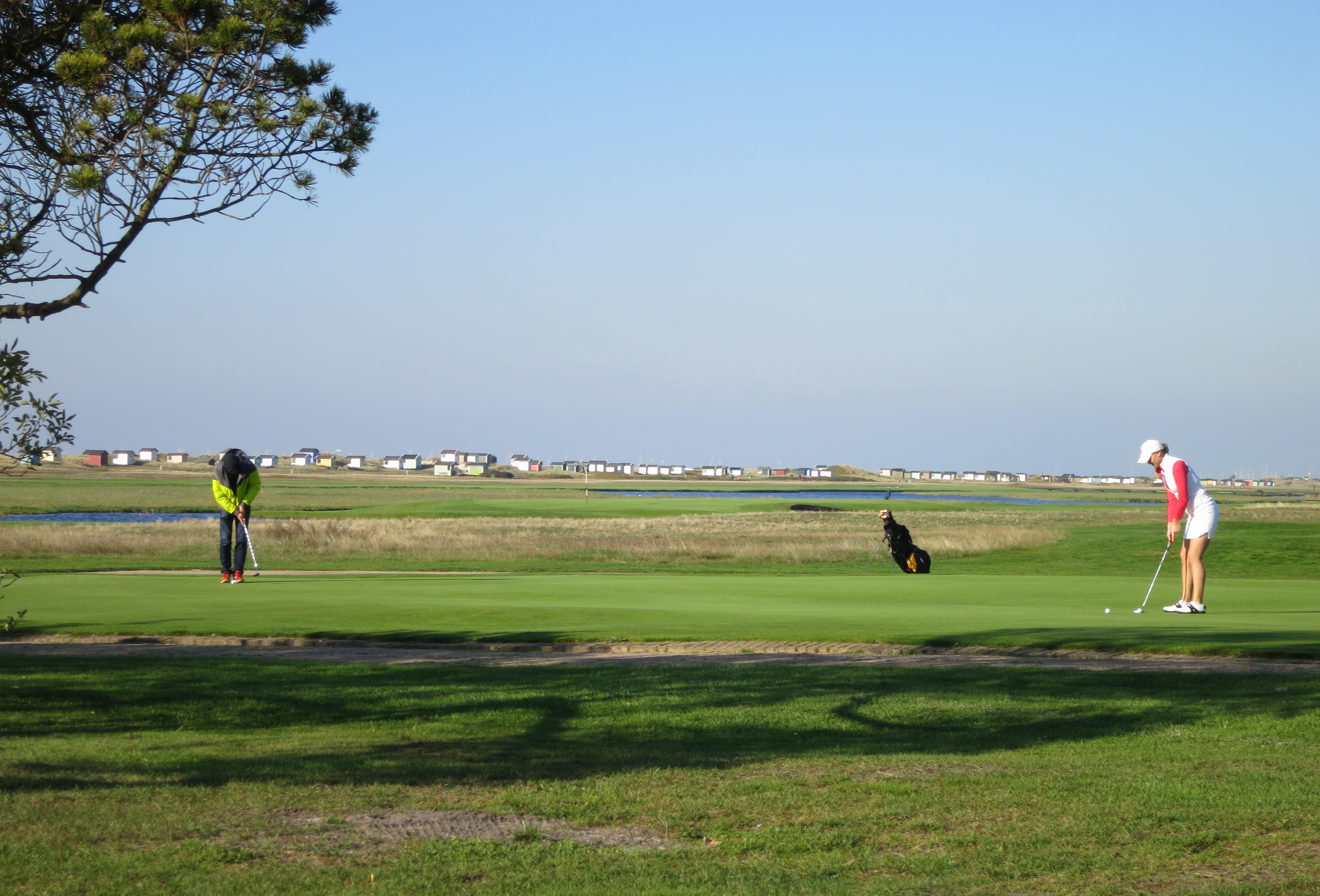 Flommens golfklubb